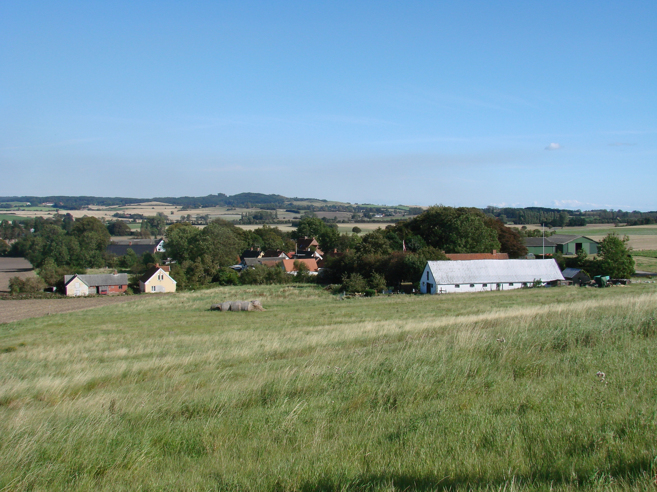 2007: Et kik ud over Råbymagle set fra vest.